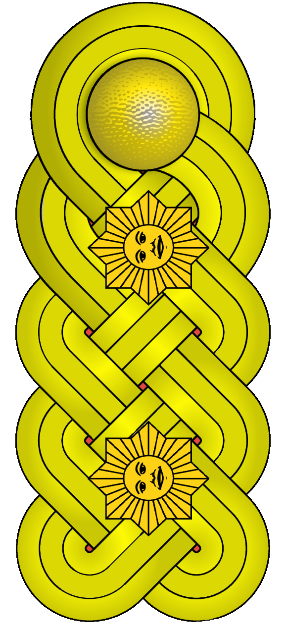 Oficialidad del EJB y la GNB